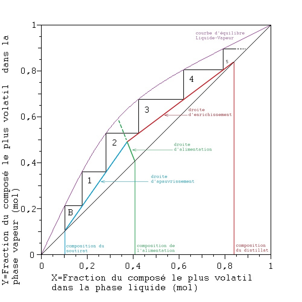 Graphique de McCabe&Thiele